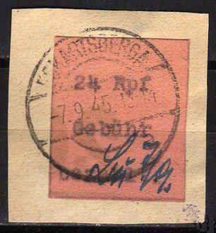 Провизорная марка, выпущенная в городе Эккартсберга (Провинция Саксония)